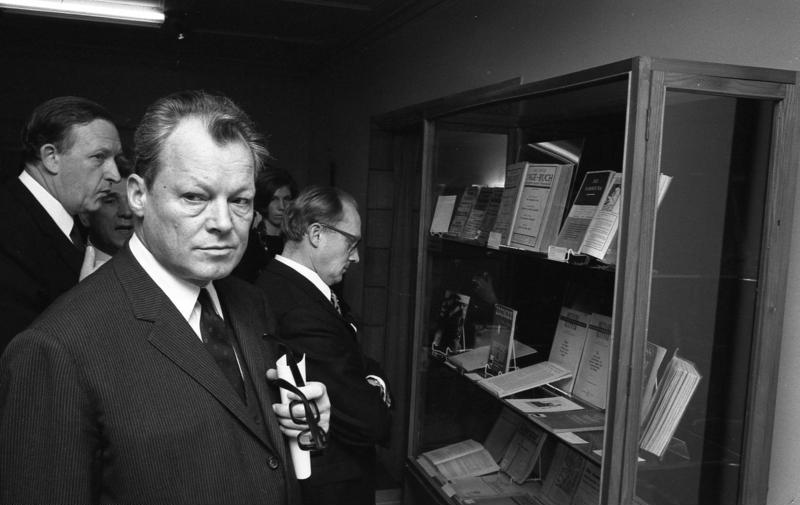 Exilanten-Tagung in Luxemburg Eröffnung der Ausstellung "Exil-Literatur" 17.-18.1.1968